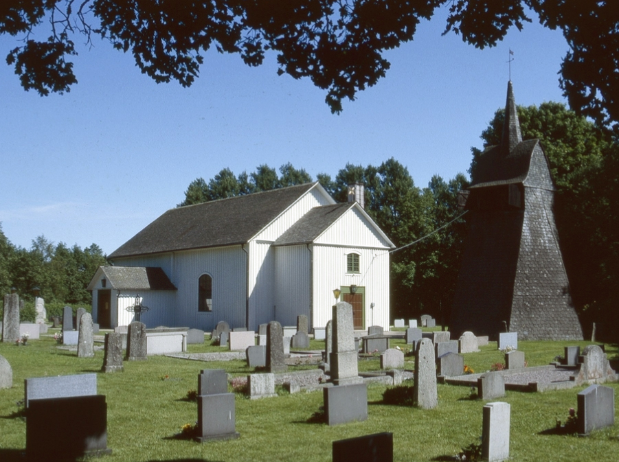 Dalskogs kyrka